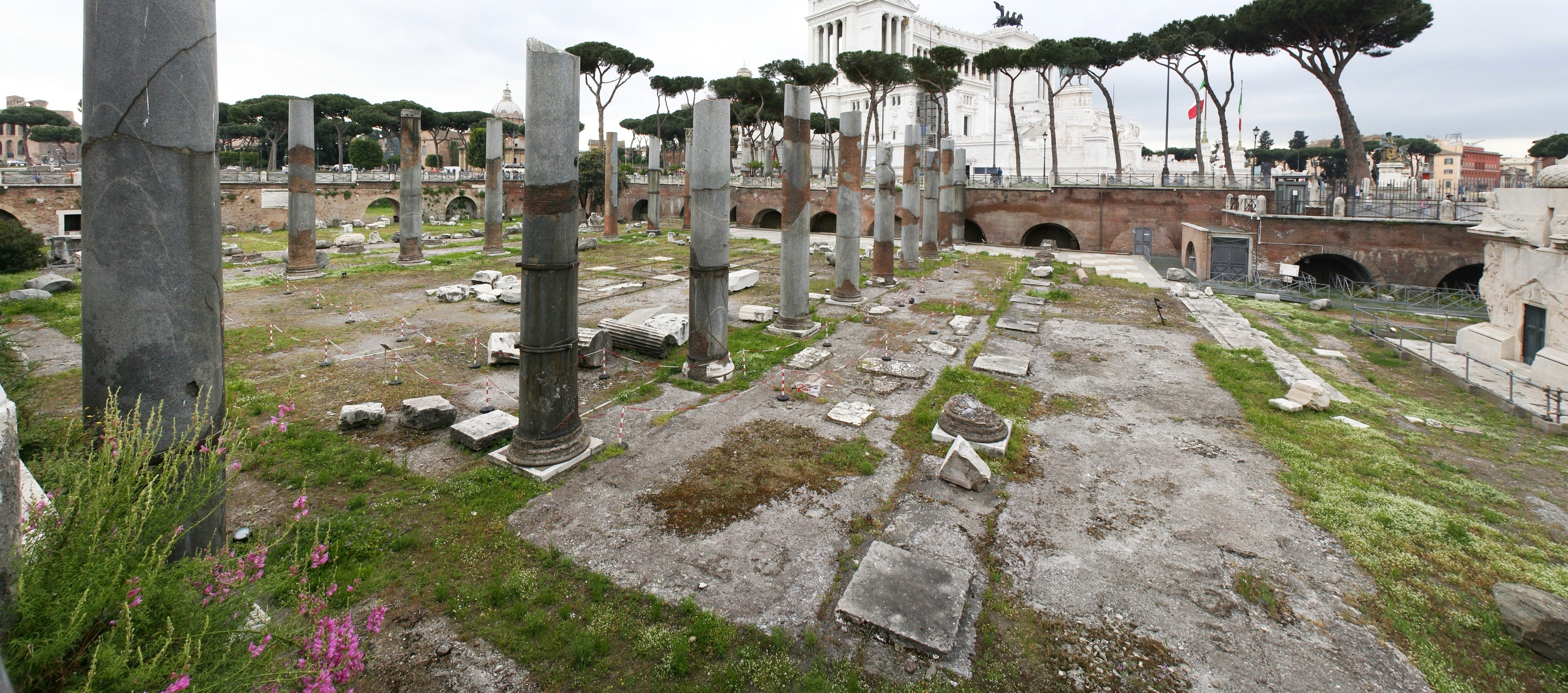 Vestiges de la partie nord du forum de Trajan avec à gauche les ruines de la basilique Ulpia et complètement à droite le piédestal de la colonne Trajanne. En arrière-plan, le monument à Victor-Emmanuel II.